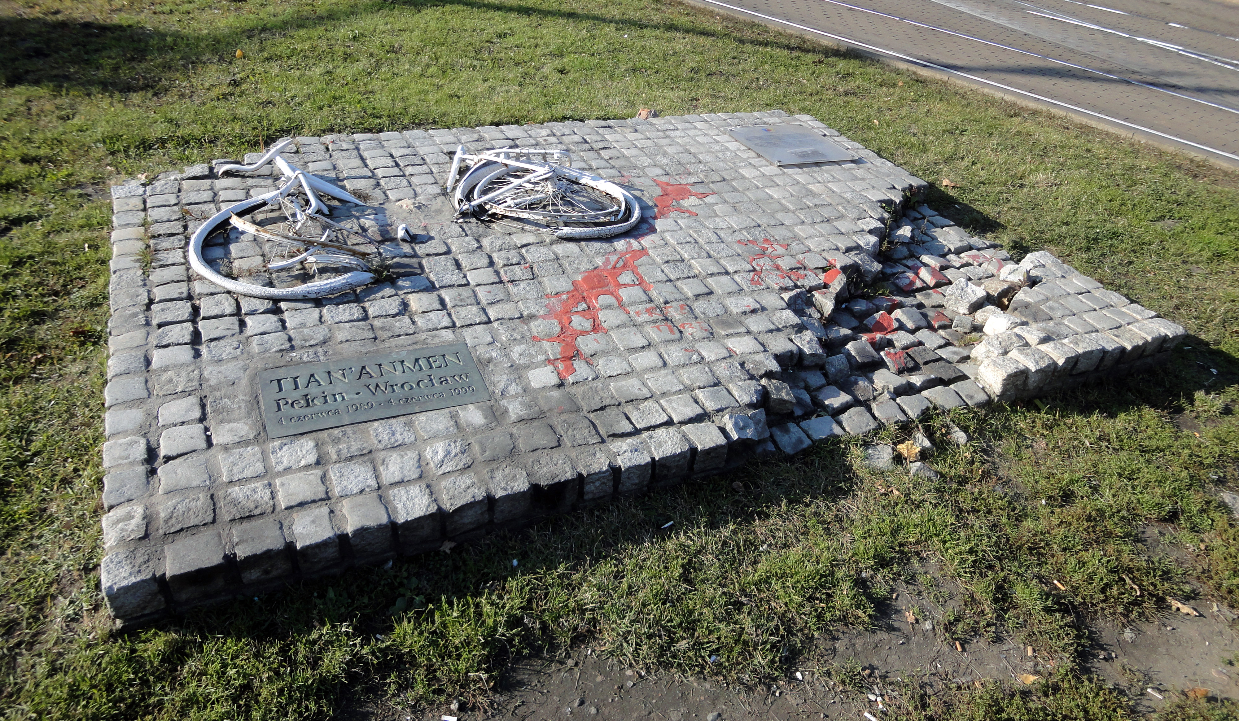 Wrocław - Pomnik ku czci Chińczyków z Tien-An-Men na placu Dominikańskim